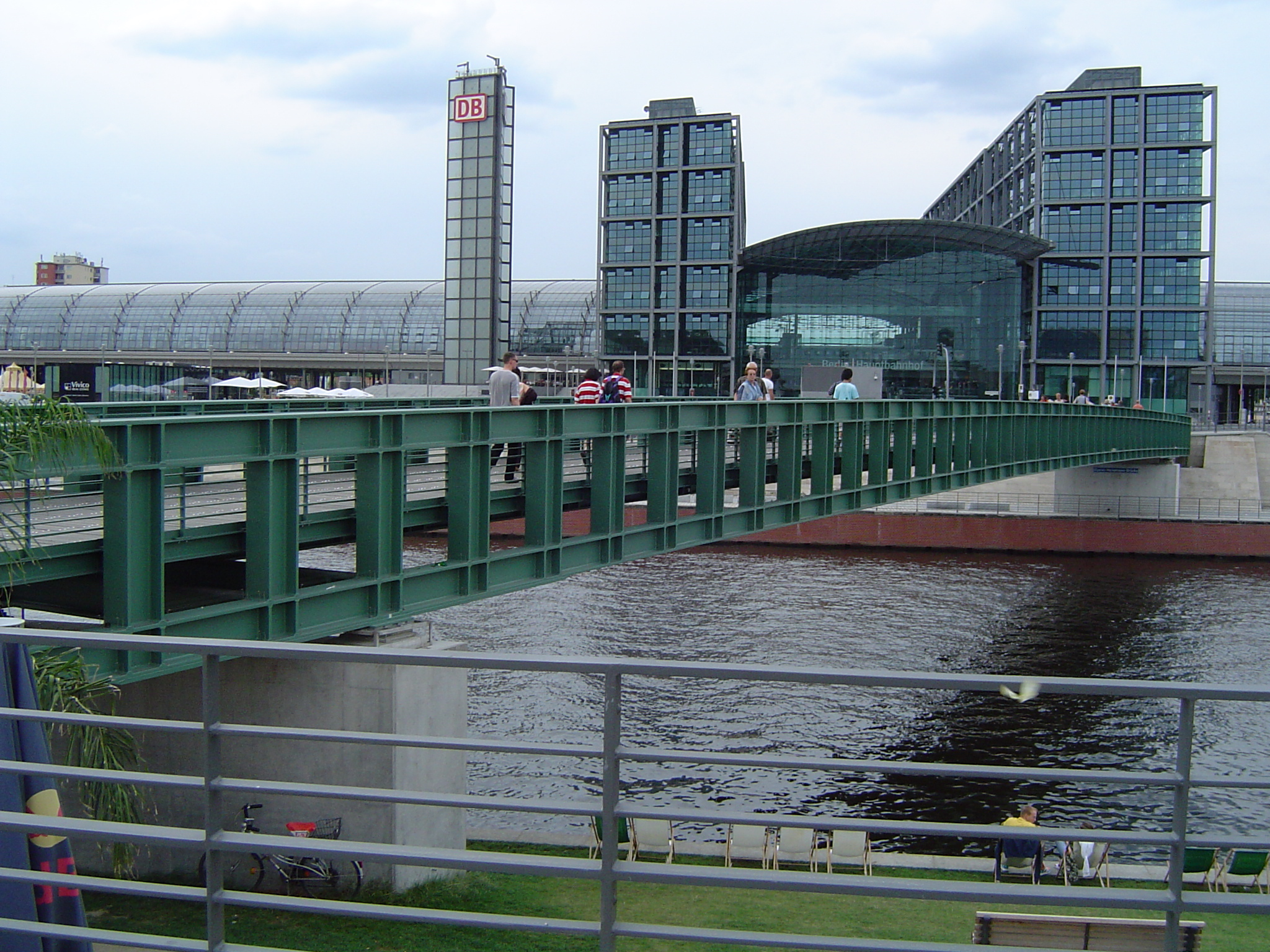 Image shows the Gustav-Heinemann-Brücke in Berlin-Mitte.